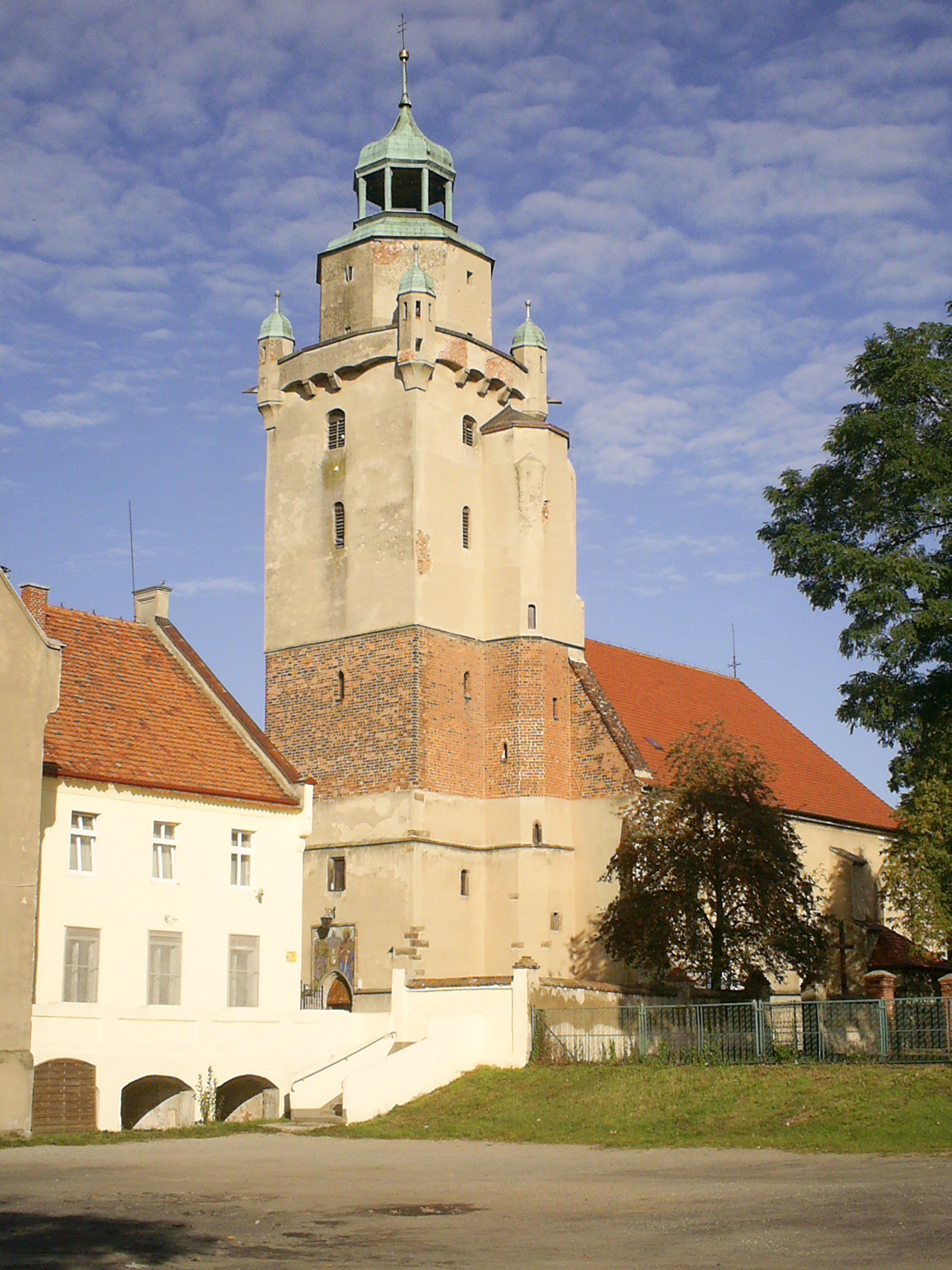 Kąty Wrocławskie, ul. Kościelna 2 - rzymskokatolicki kościół parafialny p.w. św. Piotra i Pawła